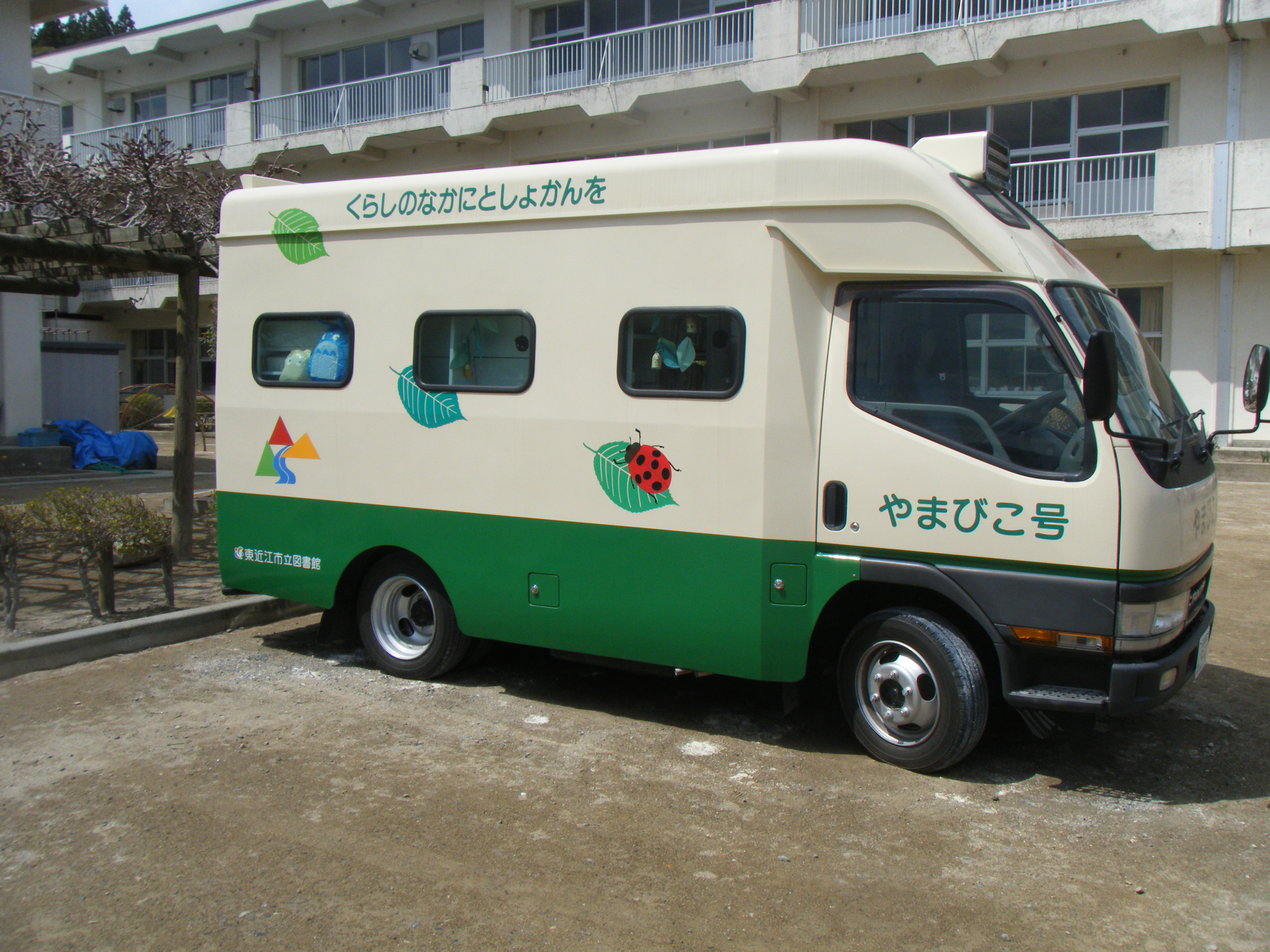 東近江市から陸前高田市立図書館に寄贈された移動図書館車「やまびこ号」